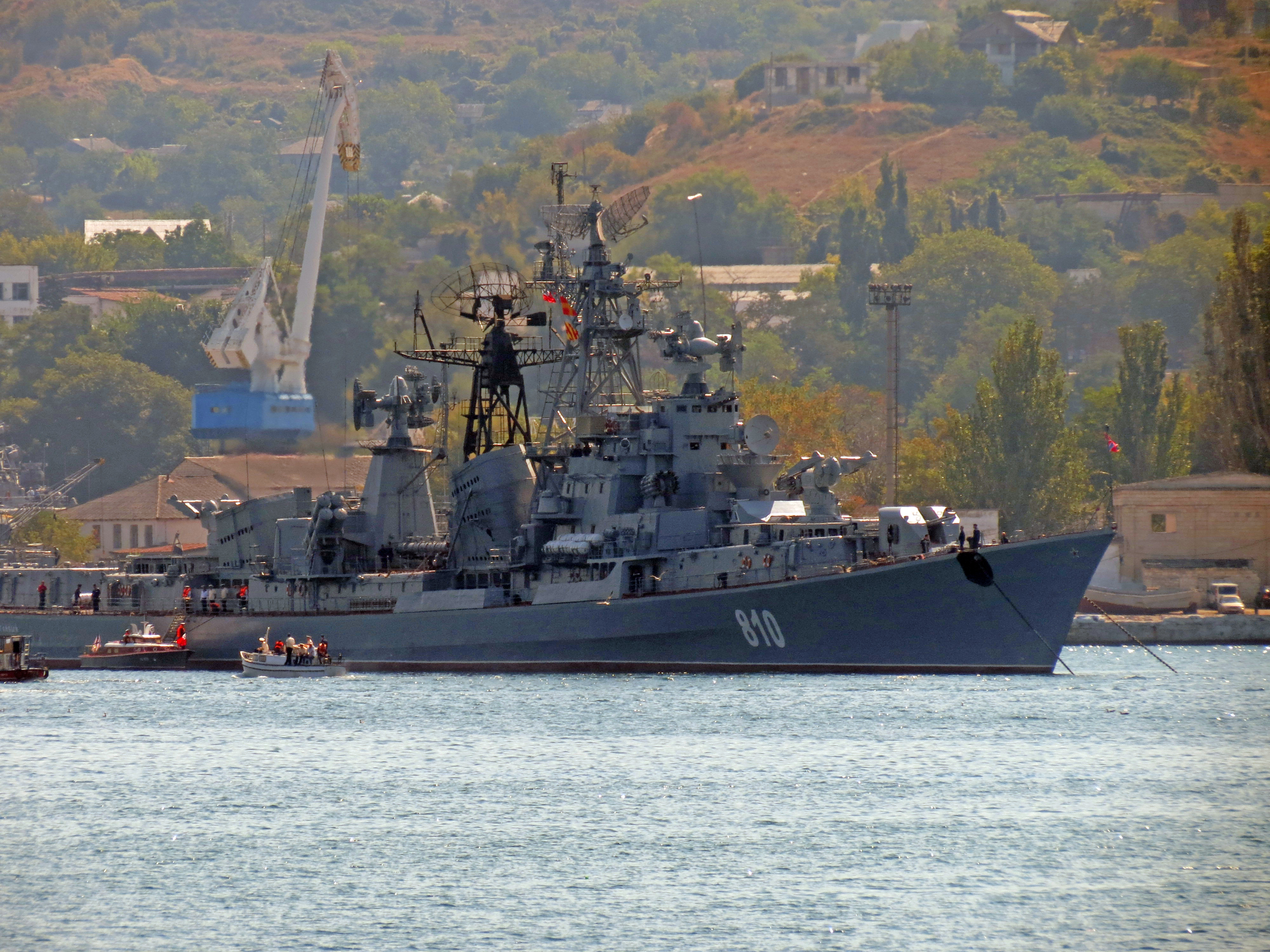 Большой противолодочный корабль «Сметливый». Севастополь, Украина